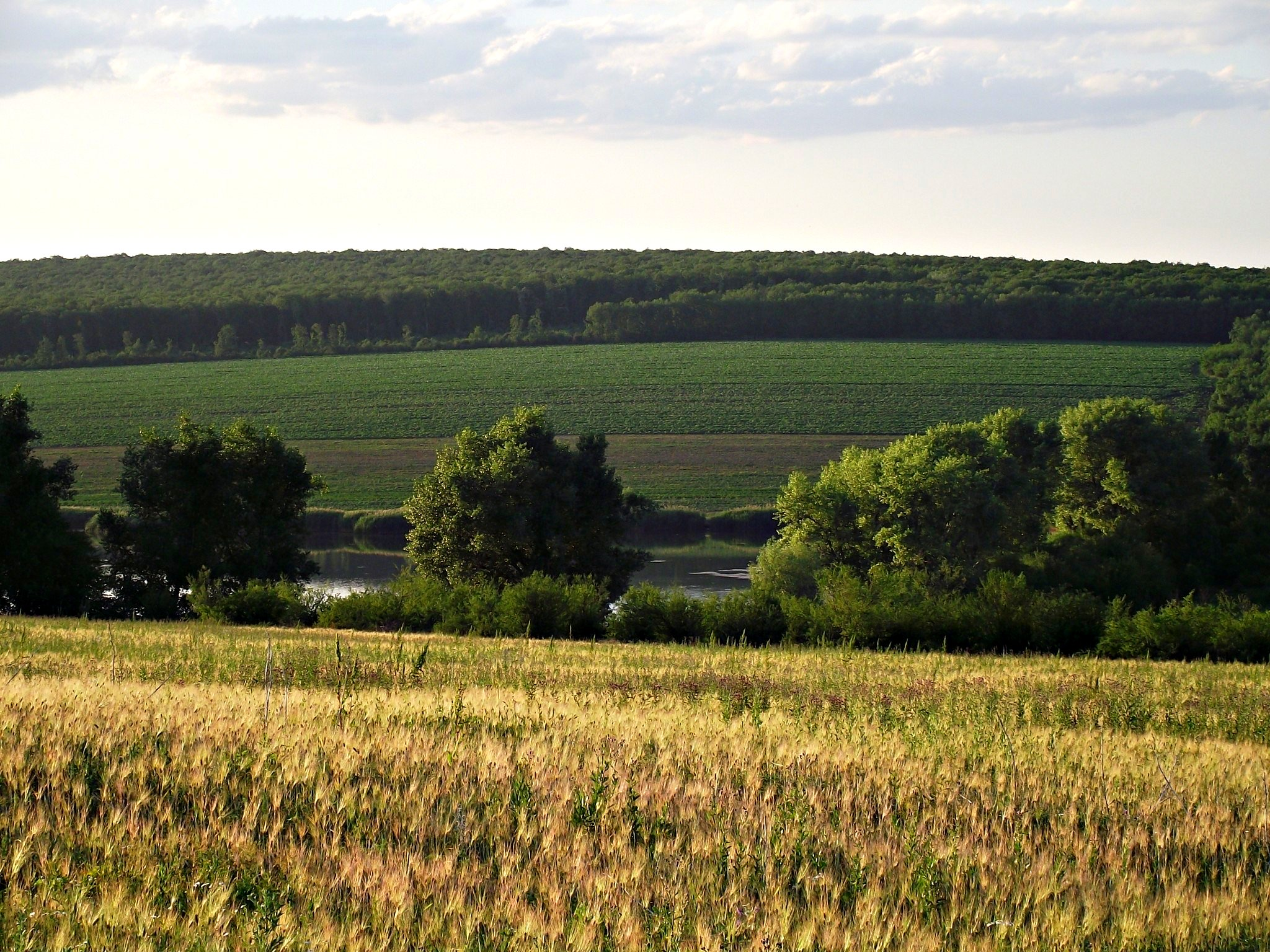 Unnamed Road, Râșcova, Moldova